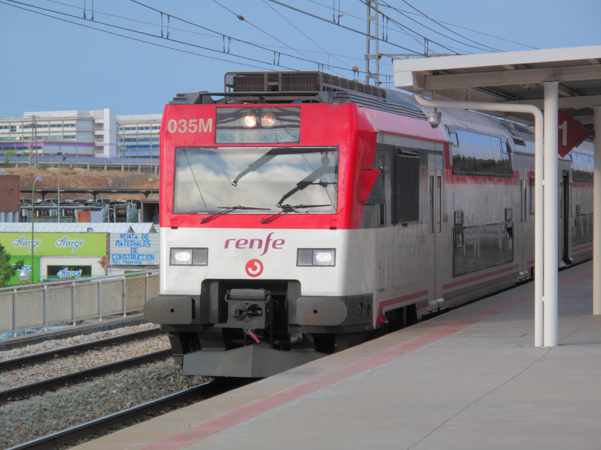 Un automotor de la serie 450 de Renfe, que realiza un servicio de Cercanías Madrid, en la estación de Vallecas, a punto de iniciar la marcha hacia Atocha Cercanías.